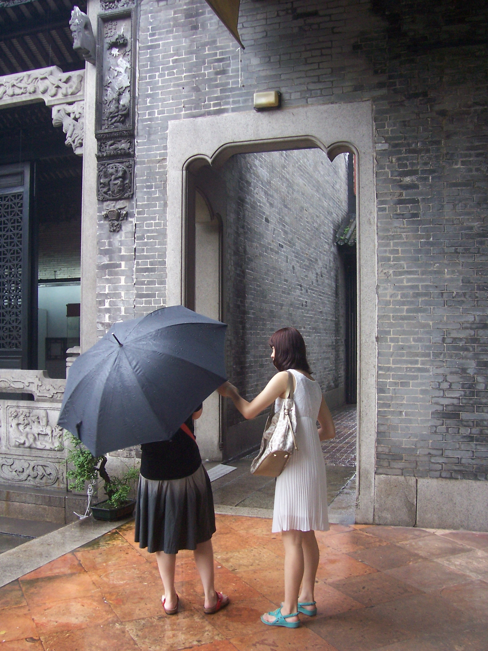 Touristes visitant le temple du clan Chen à Canton.